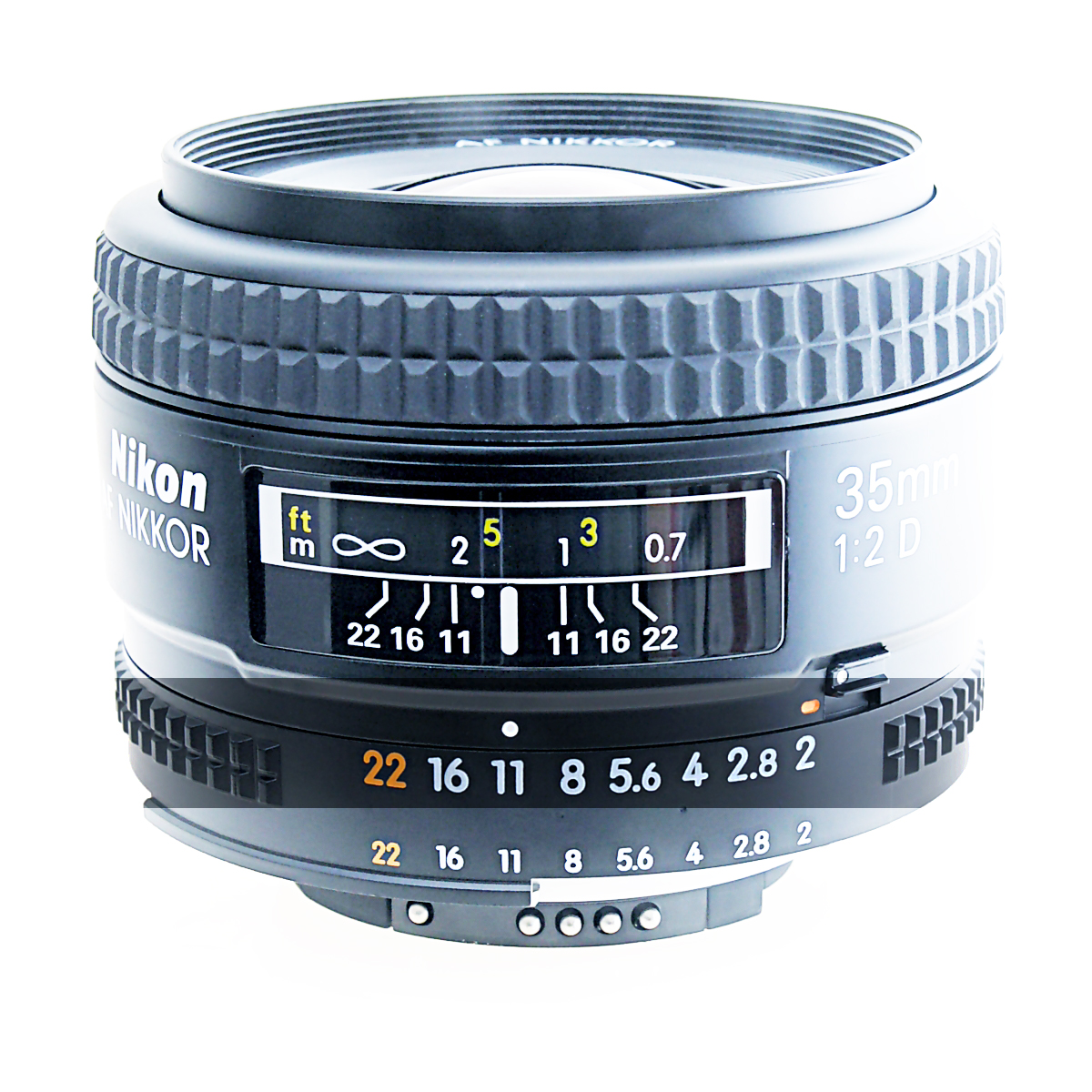 Blenderank un engem Fotosobjektiv.